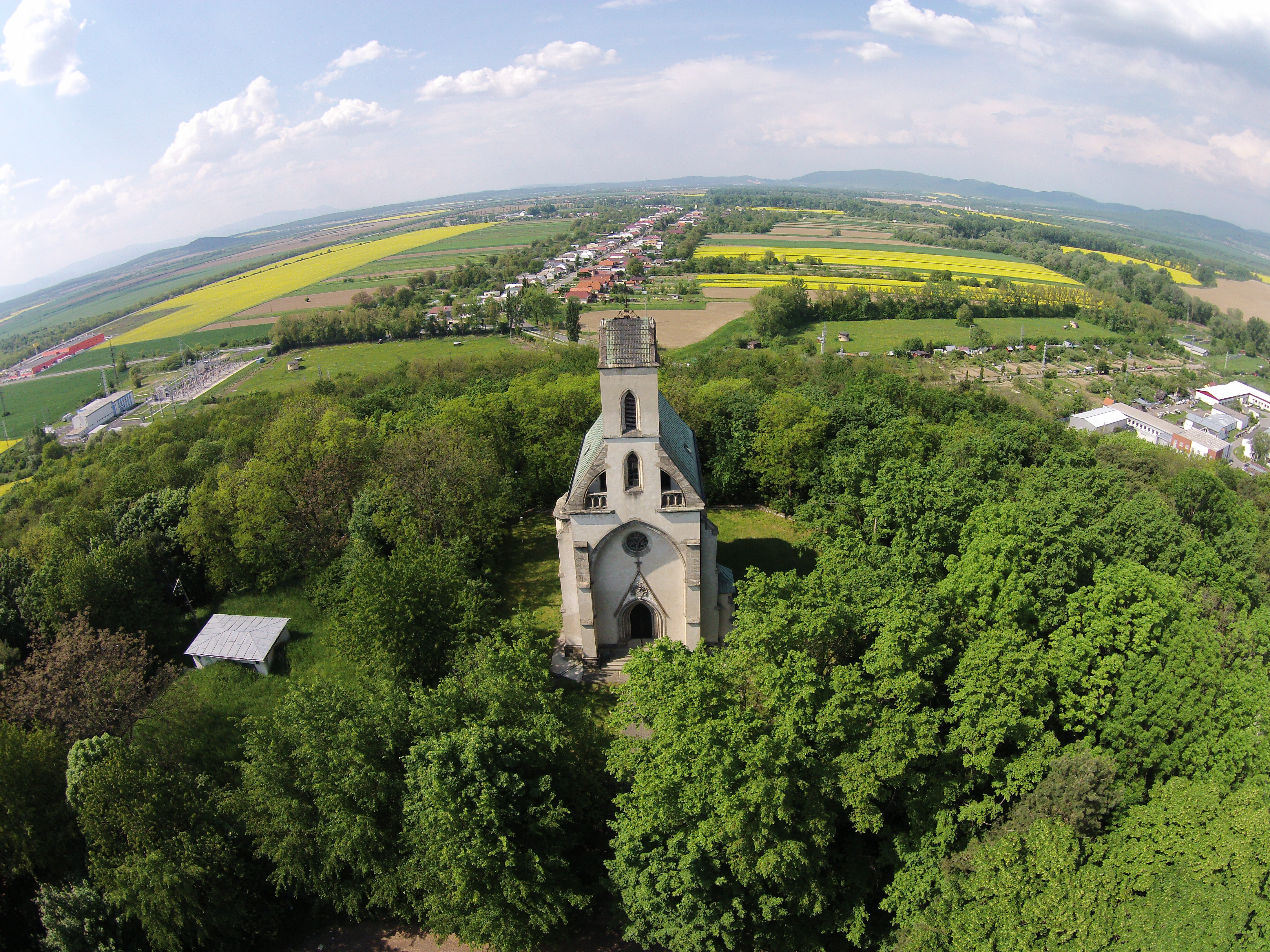 Kaplnka sv. Antona Paduánskeho na Hrádku